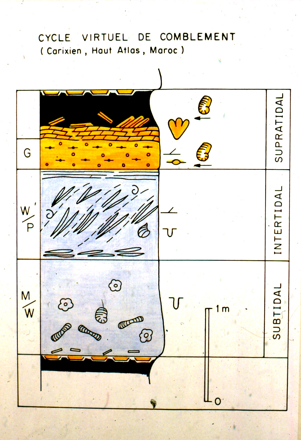 Séquence virtuelle émersive de comblement "shallowing upward sequence" caractéristique des dépôts carbonatés du Lias moyen sur la marge sud de la Téthys, valable pour le Maghreb, la plaque apulienne (Italie, Yougoslavie) jusqu'à la péninsule du Musandam en Oman et les régions himalayennes... Les fossiles (lithiotidés, foraminifères, algues) sont identiques tout au long de la marge sur plus de 10.000 km ! Illustration en photos ci-dessous. Plus d'info. sur